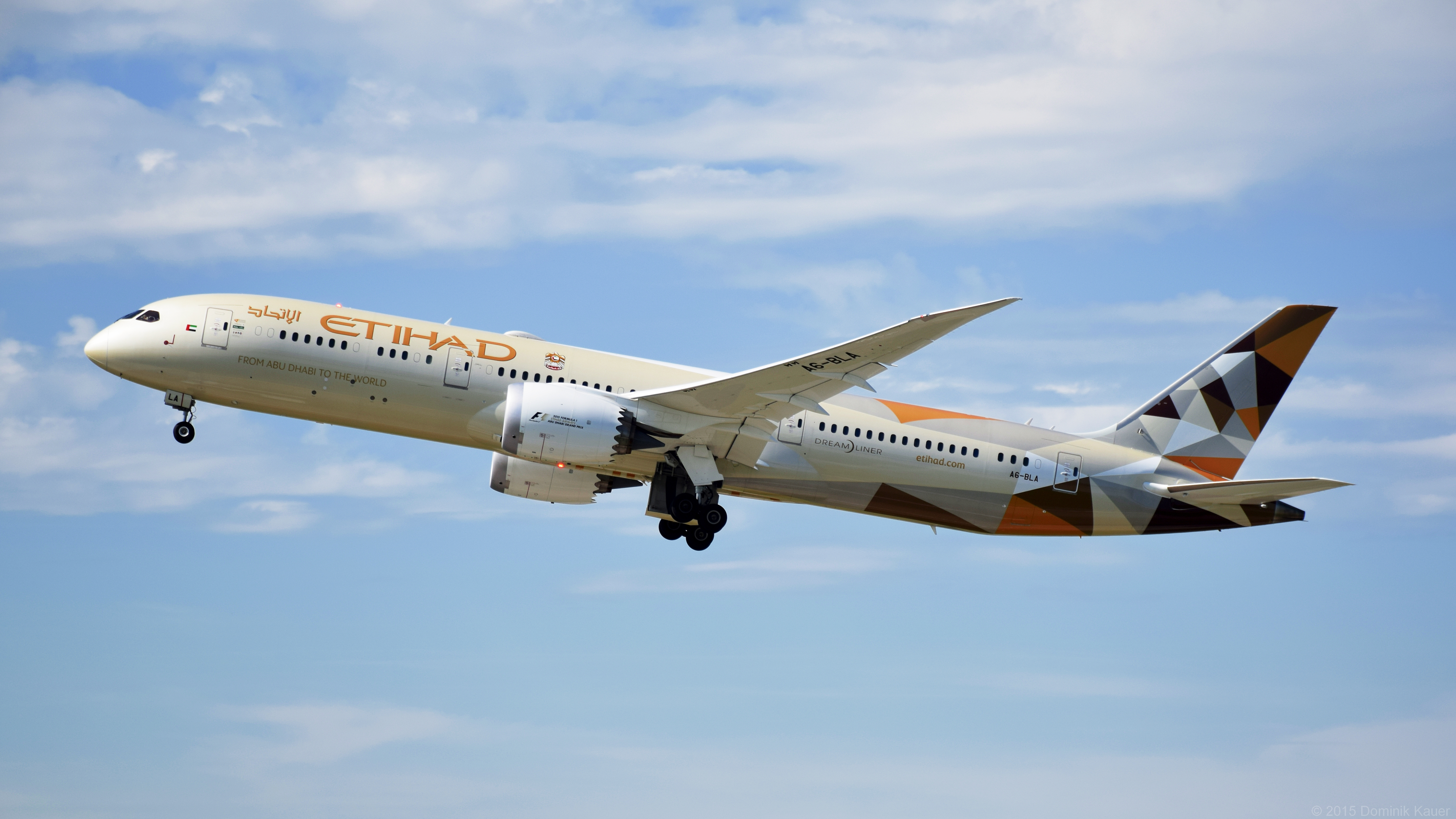 Etihad Airways Boeing 787-9 Dreamliner departing in zurich